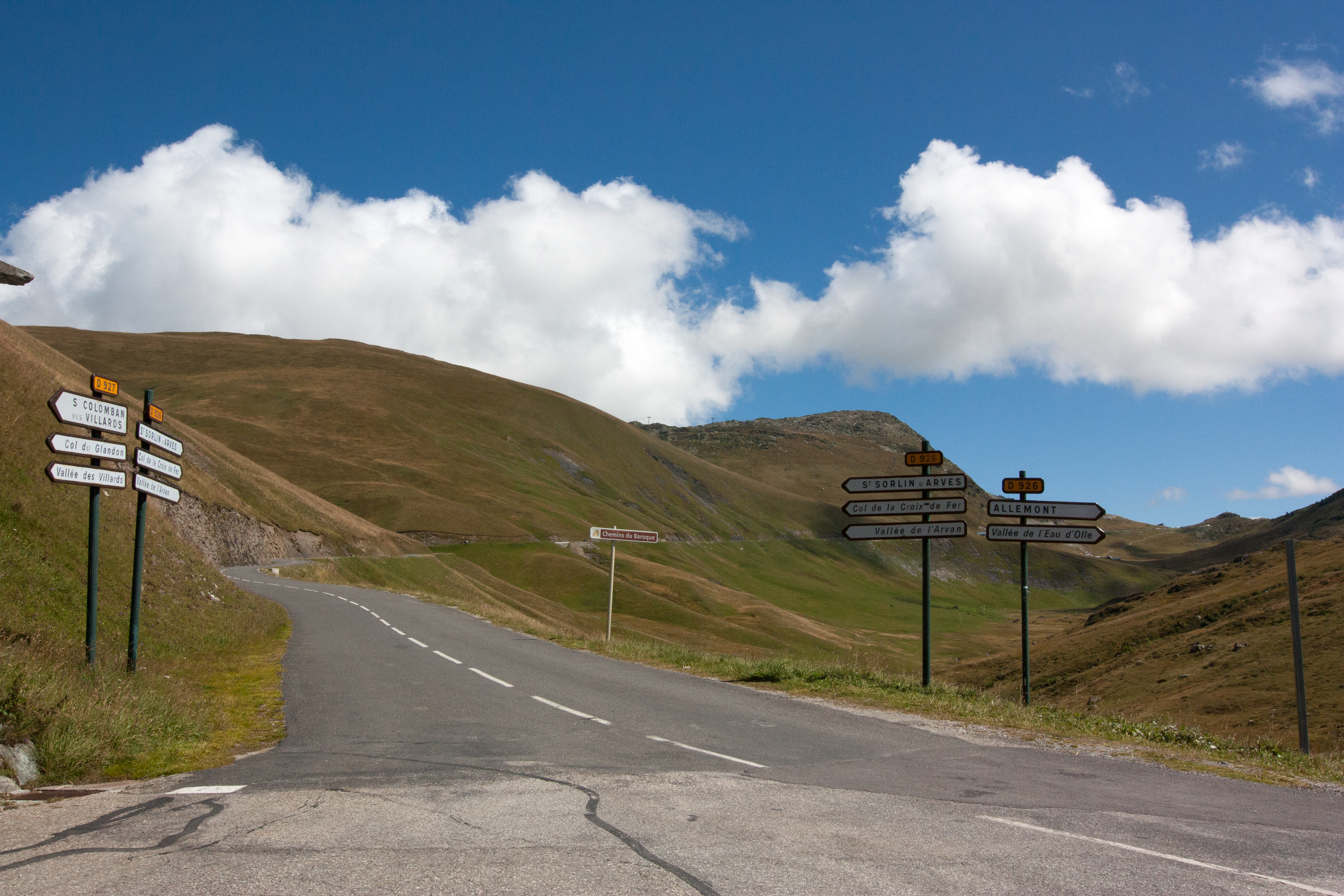 Vue depuis le col du Glandon / Saint-Colomban-des-Villards / Savoie / France